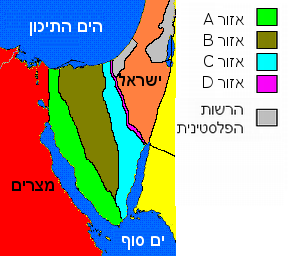 MFO